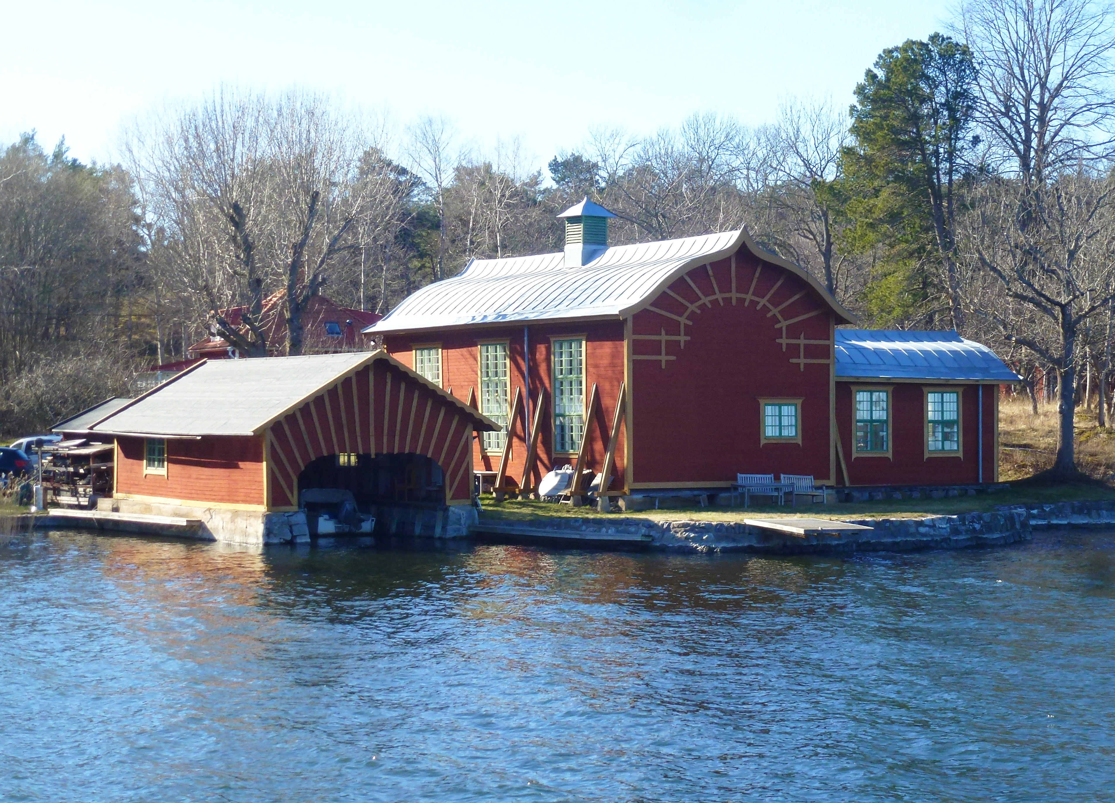 Täcka udden, Hangar och båthus